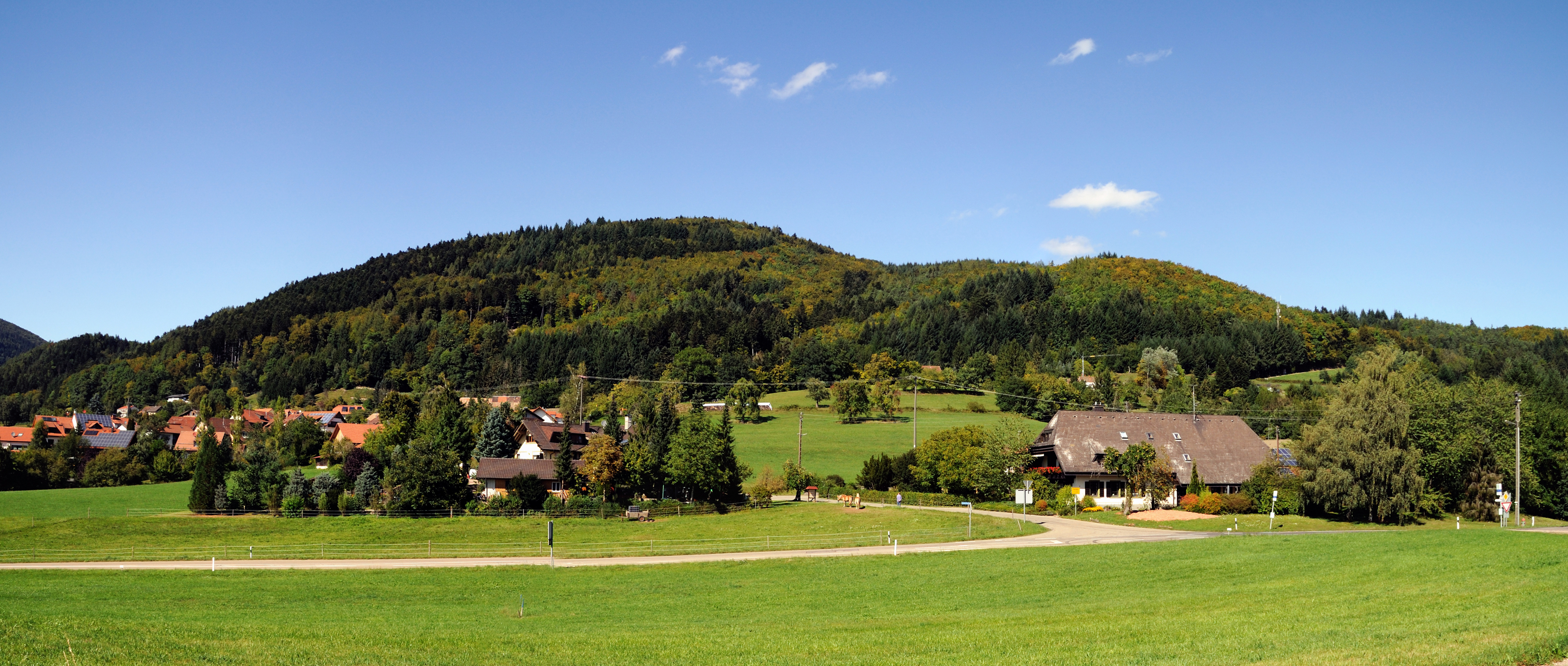 Hofen